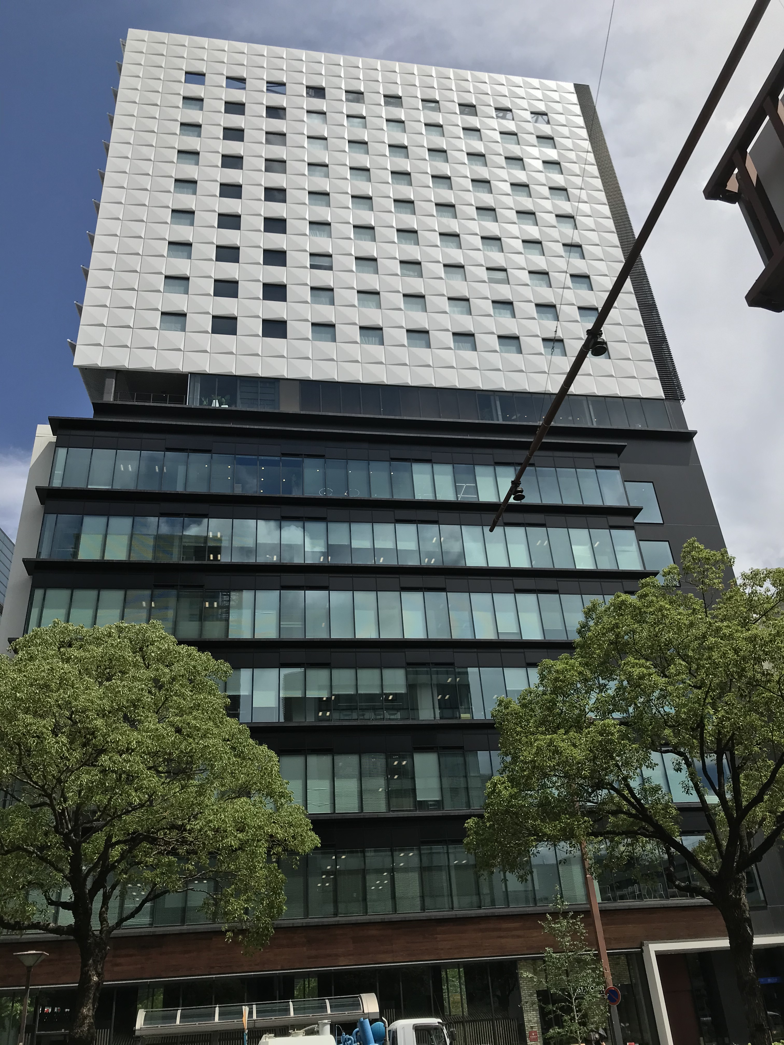 三重交通グループ各社が入居する名古屋駅前のビル